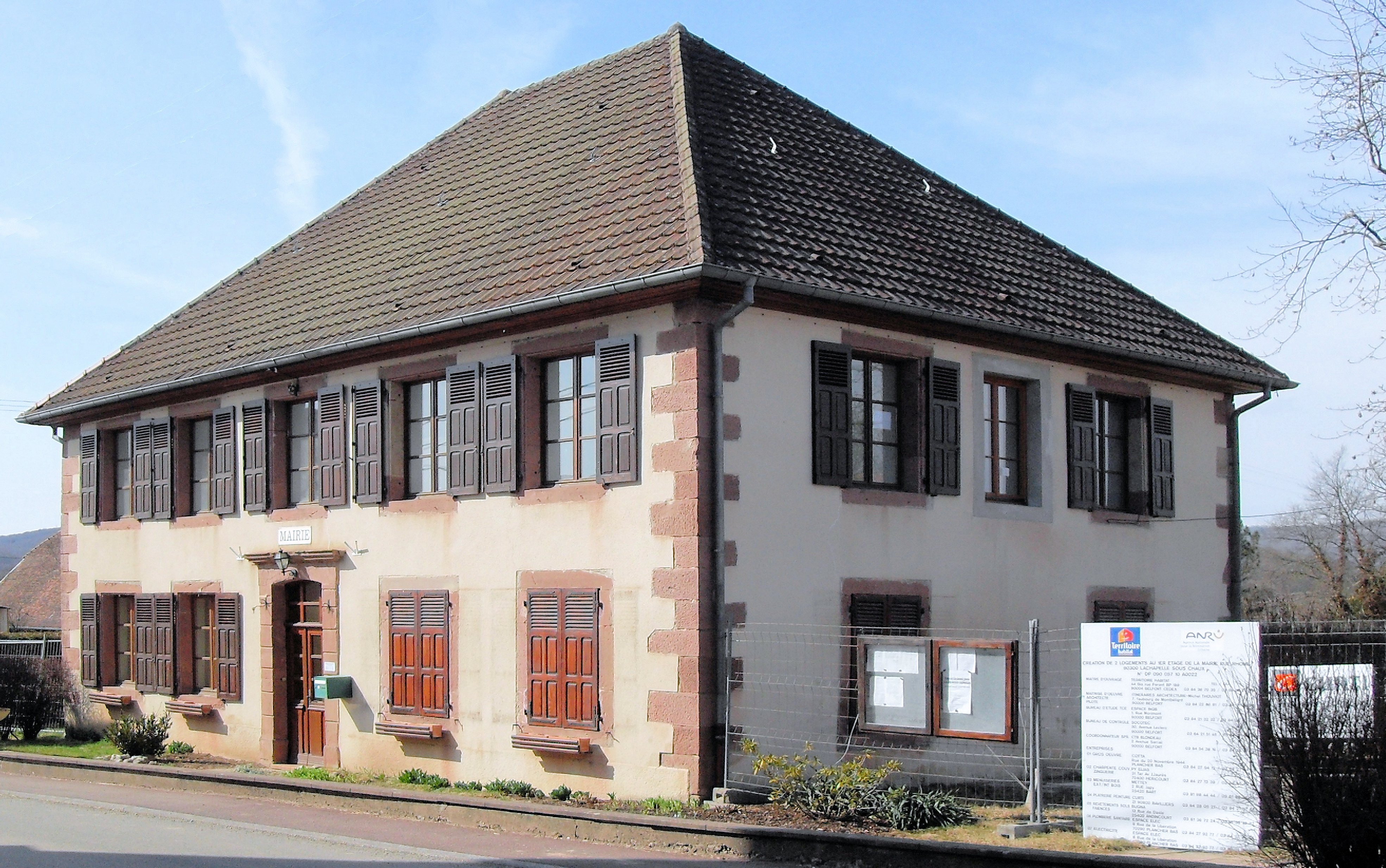 La mairie de Lachapelle-sous-Chaux